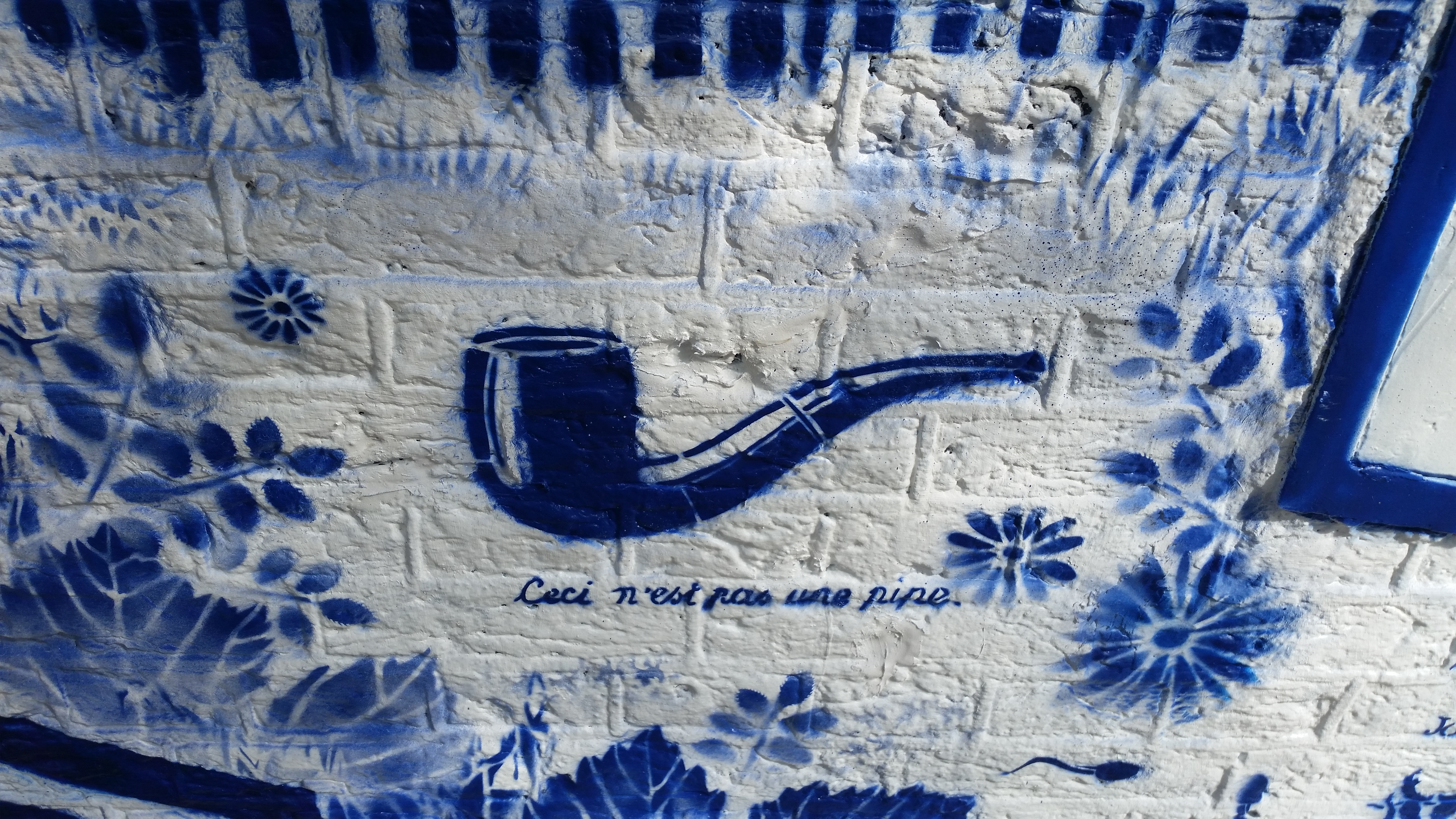 Hemonystraat 4, Amsterdam, Citaat van beroemd schilderij van René Magritte door Hugo Kaagman